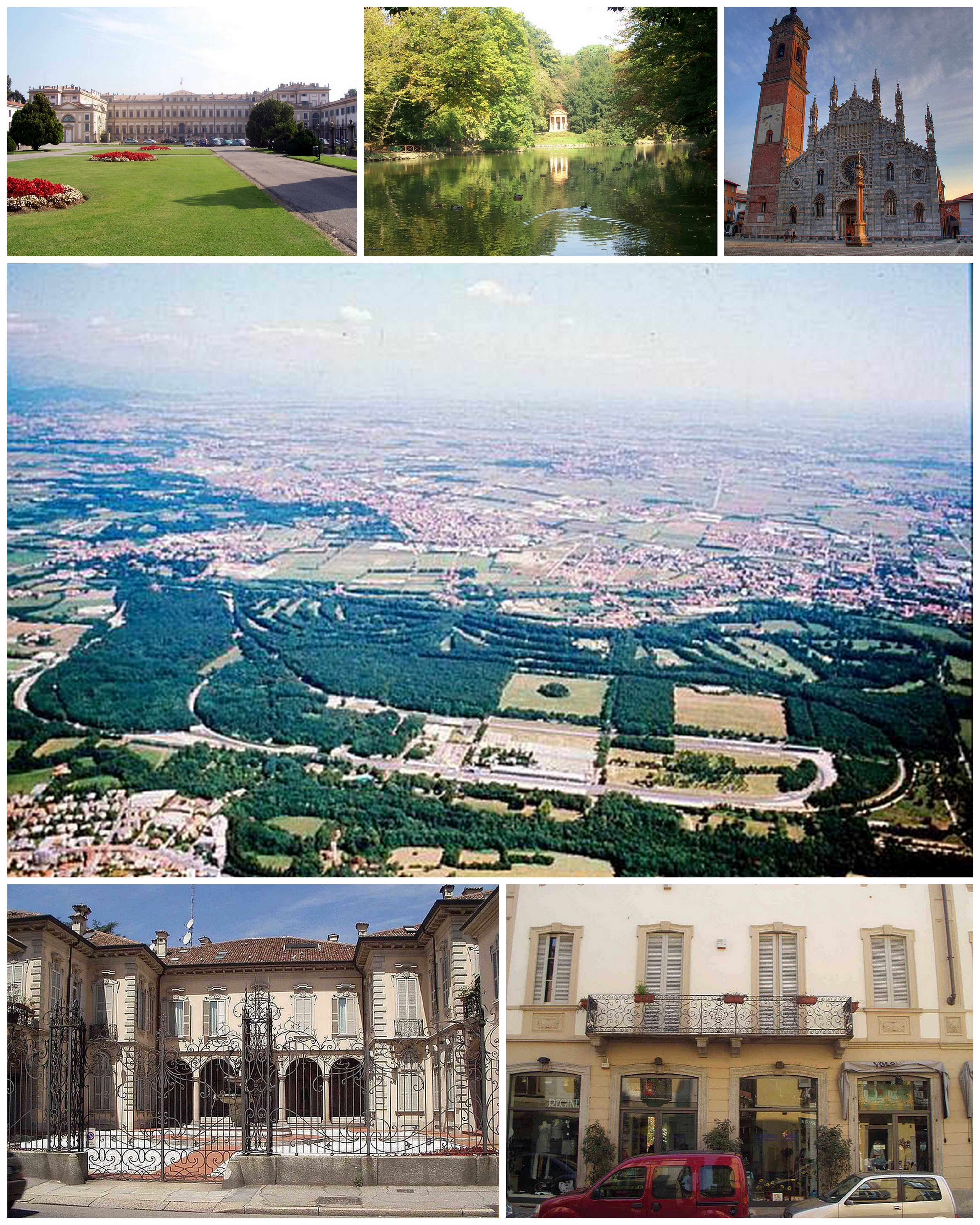 Collage di varie foto su Monza.